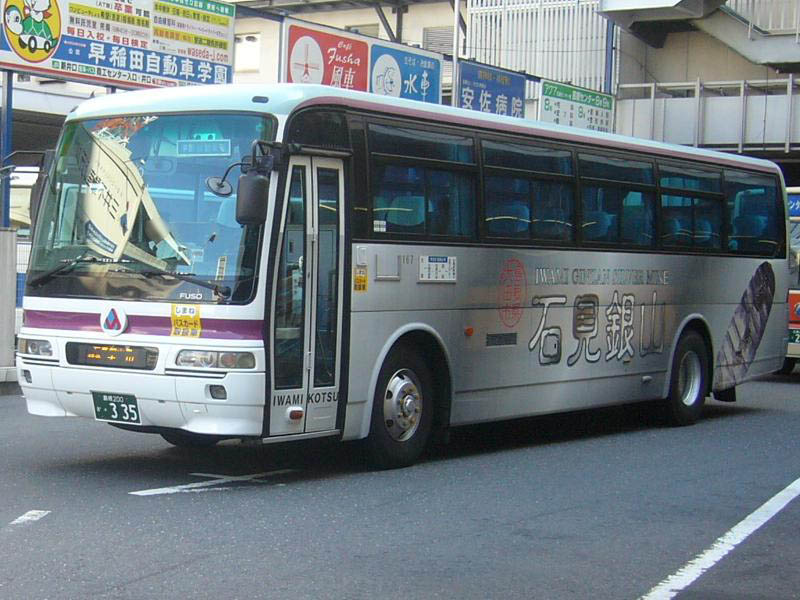 登録番号：島根200か・335 石見交通所属 石見銀山号用 三菱ふそう・エアロバス KL-MS86MP